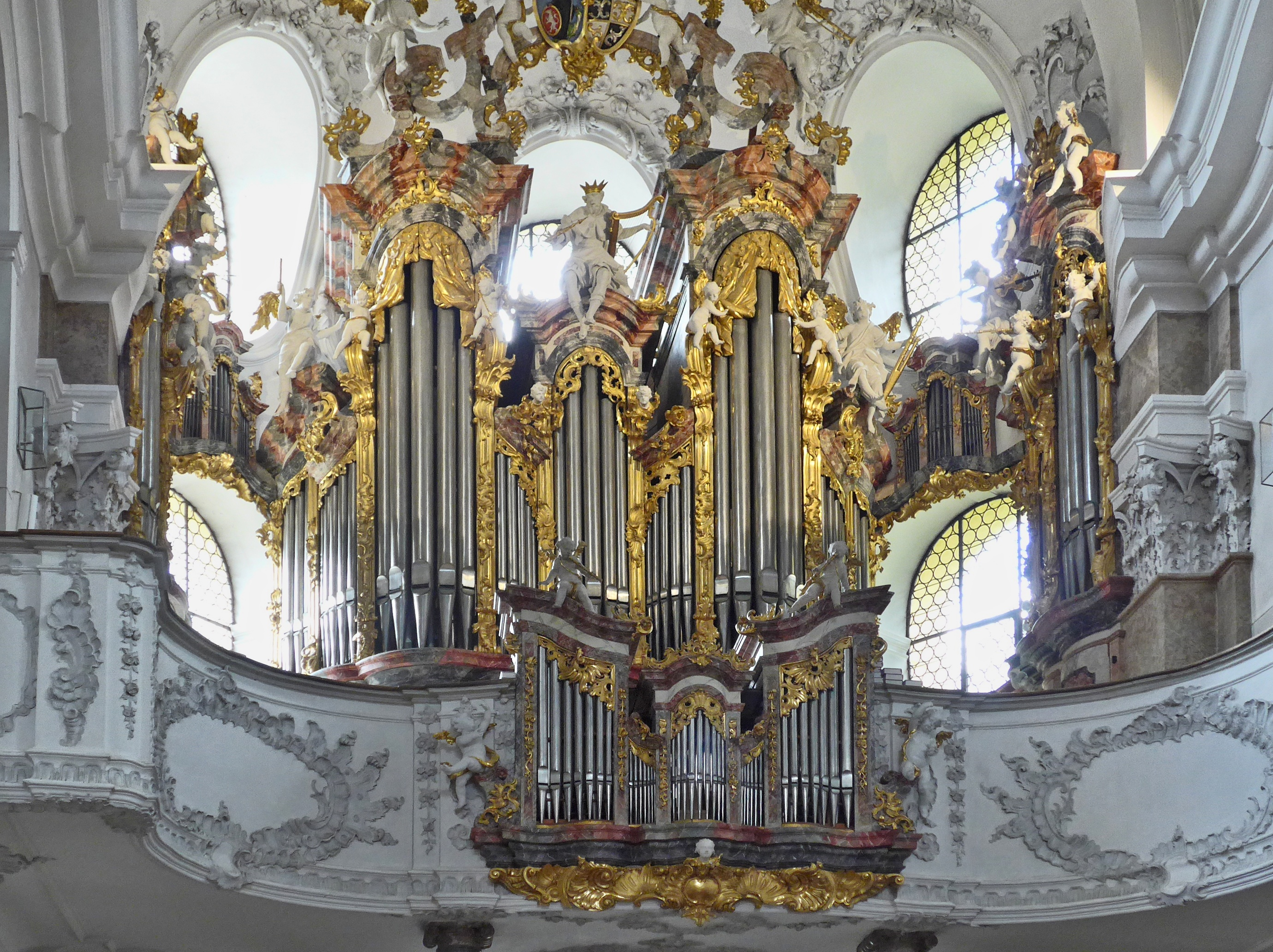 Orgel der Stadtpfarrkirche St. Mang von Andreas Jäger mit allen PfeifenThis is a photograph of an architectural monument.